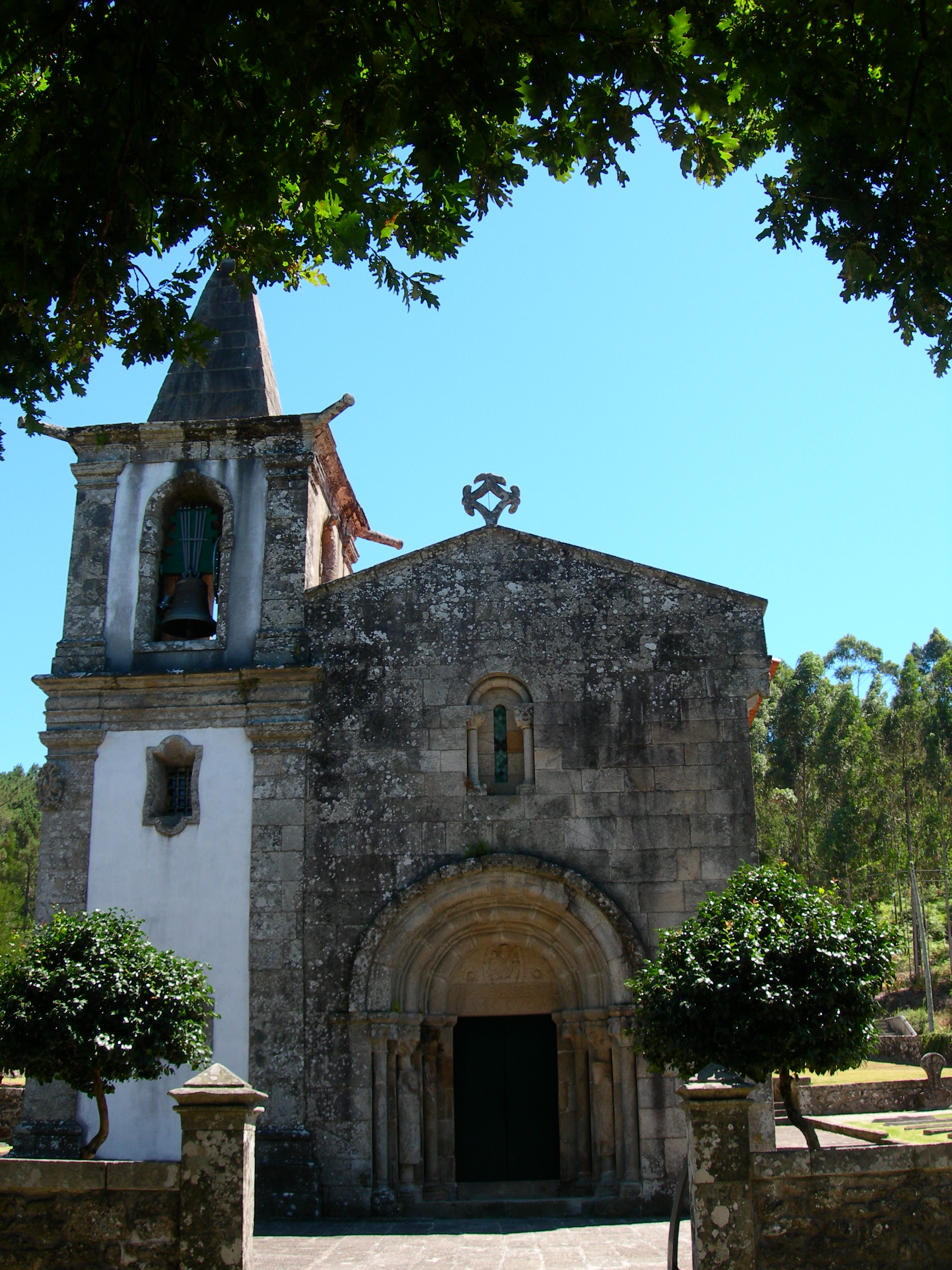 Igreja de São Pedro de Rubiães II This file was uploaded for Wiki Loves Monuments in Portugal with the unique identifier 71137.